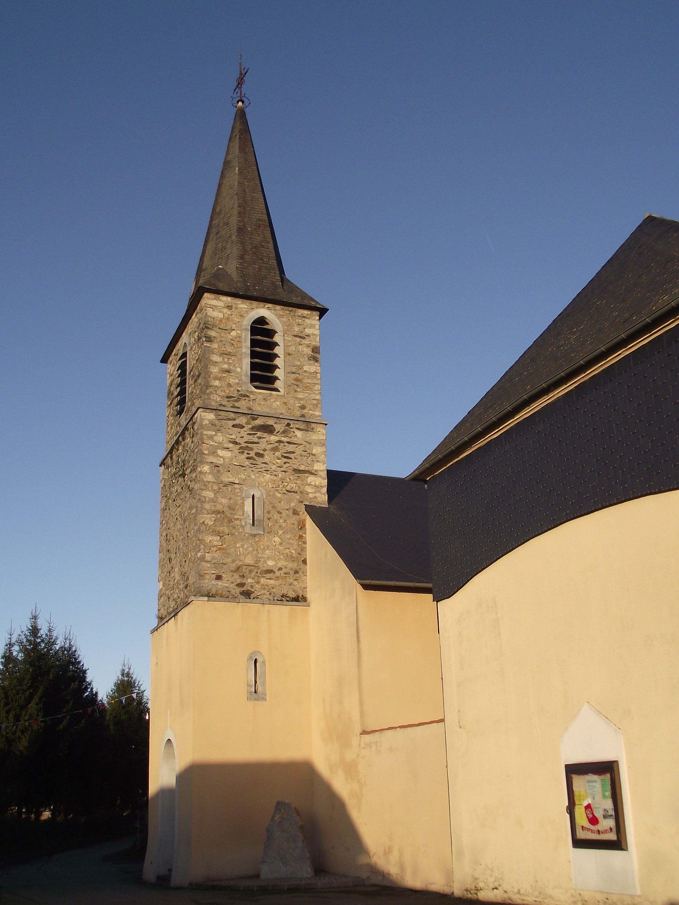 Église Saint-Martin de Loucrup (Hautes-Pyrénées, France)